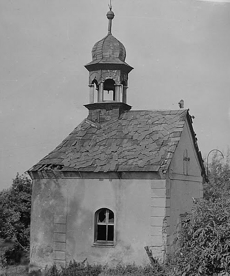 Kaple sv. Jana Křtitele v Knížecím, polovina 70. let 20. století